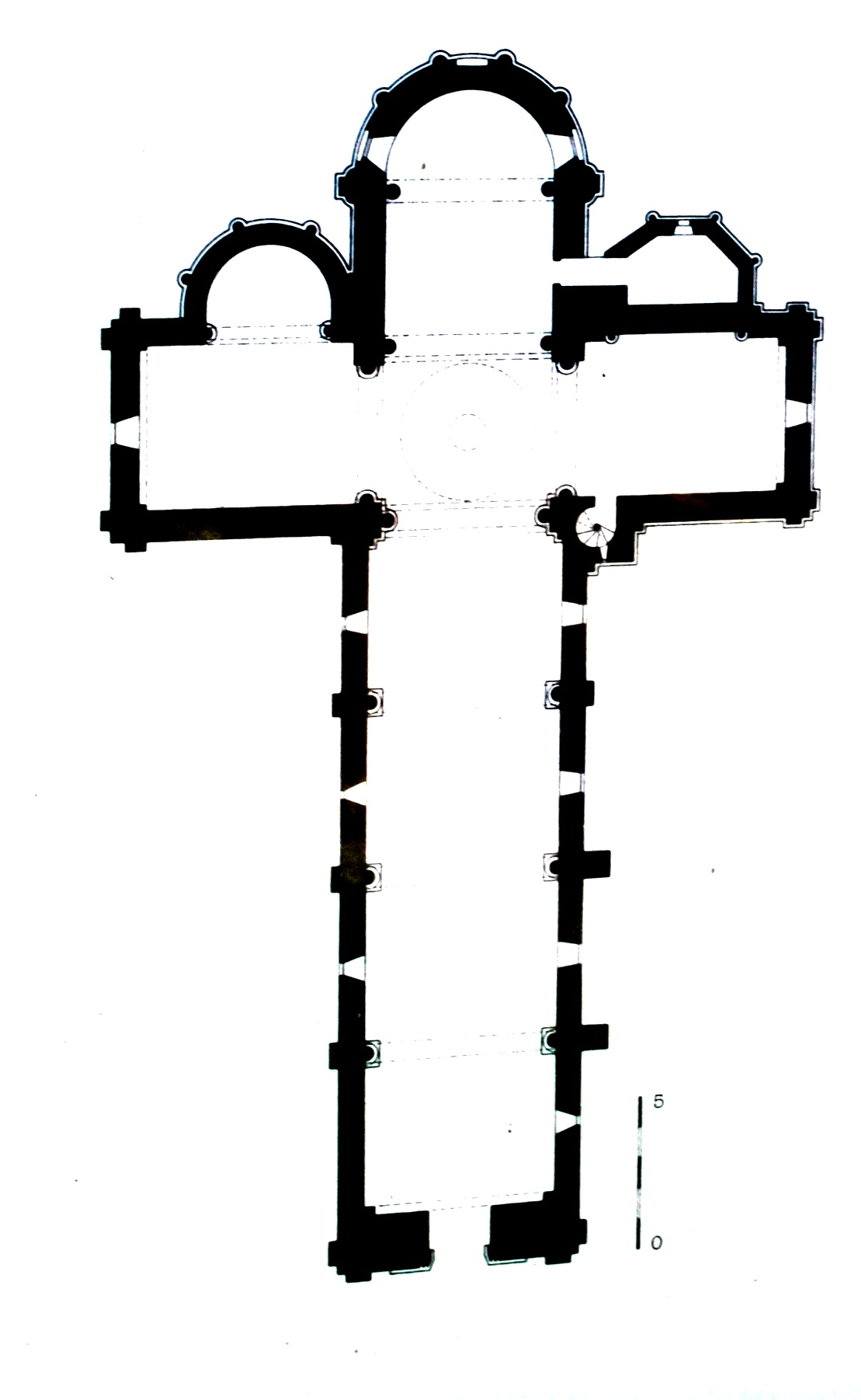 Champagnolles église Saint-Pierre, modillon